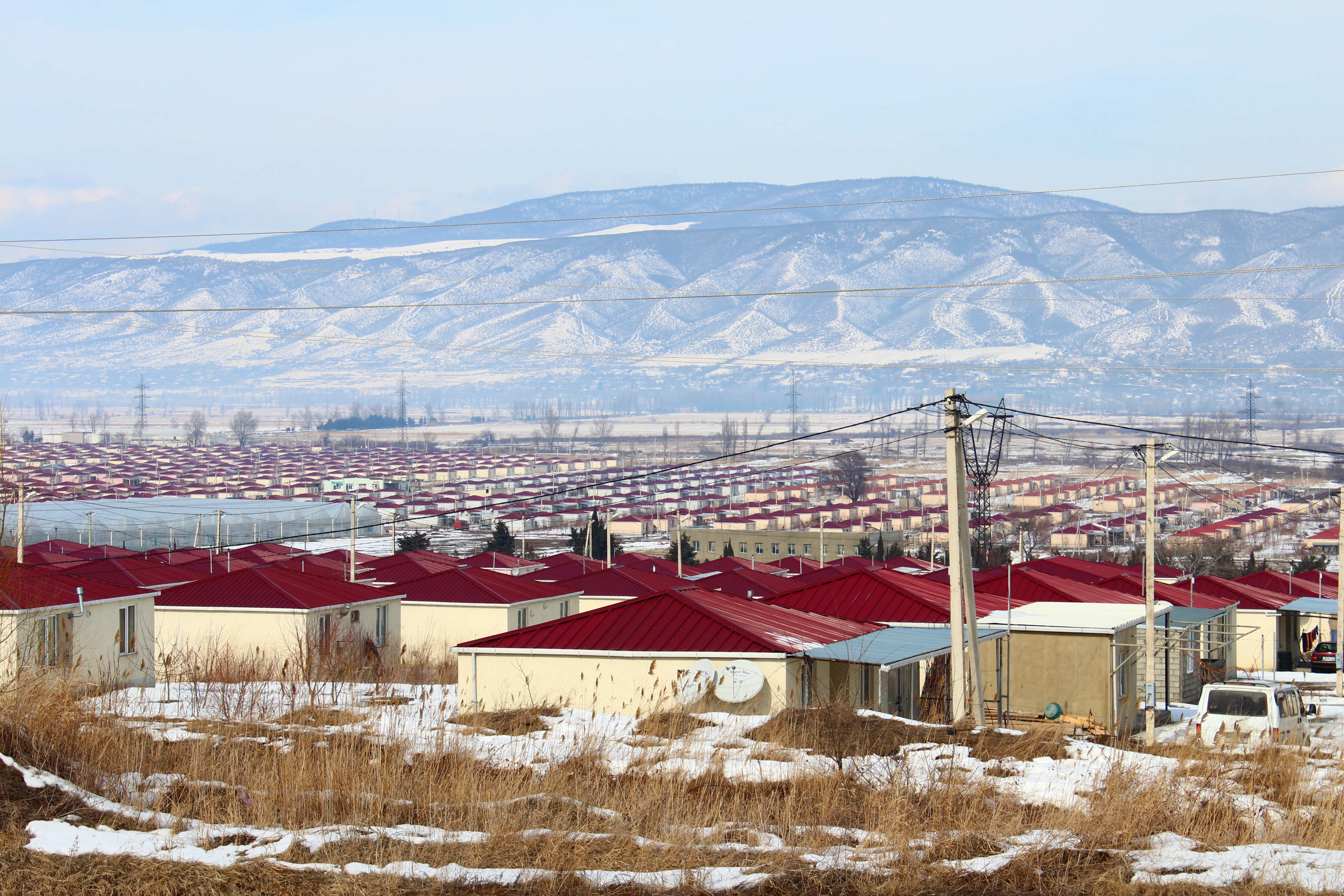 Tserovani IDP settlement